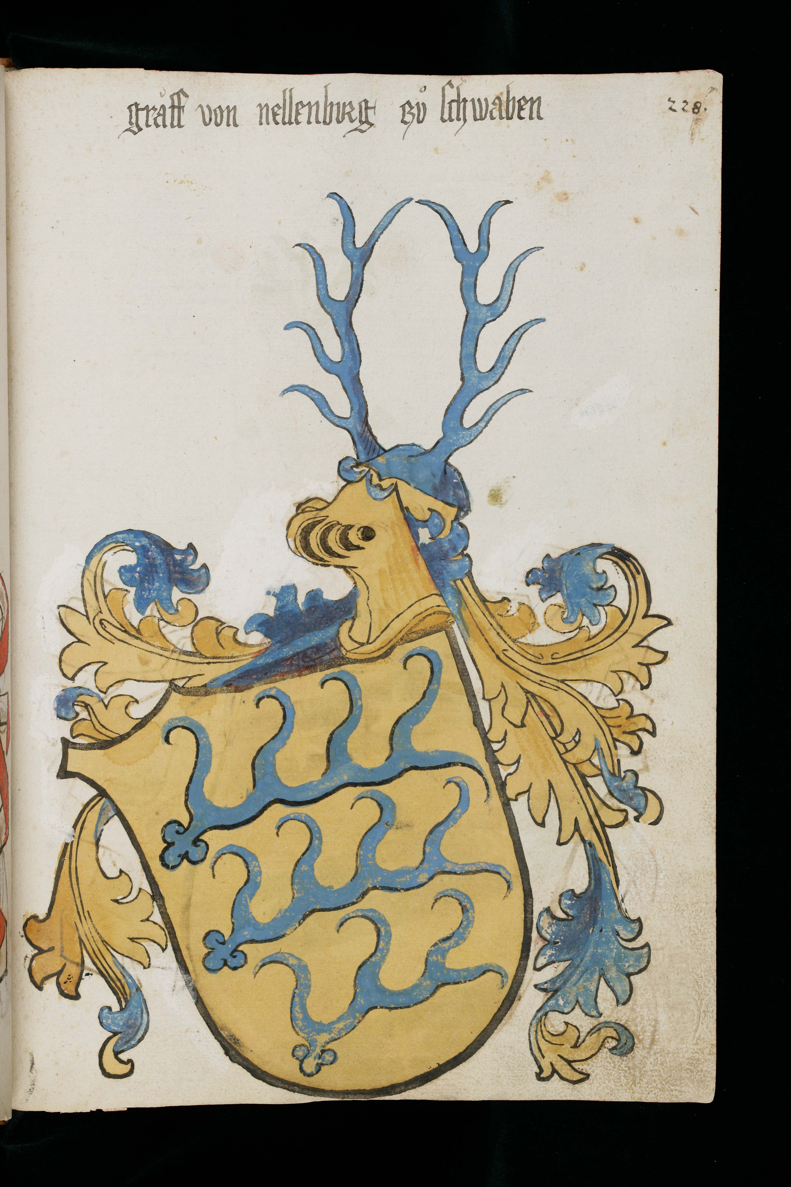 Wappenbuch des St. Galler Abtes Ulrich Rösch; Stiftsbibliothek St. Gallen, Cod. sang. 1084 Wappen: Graf von Nellenburg